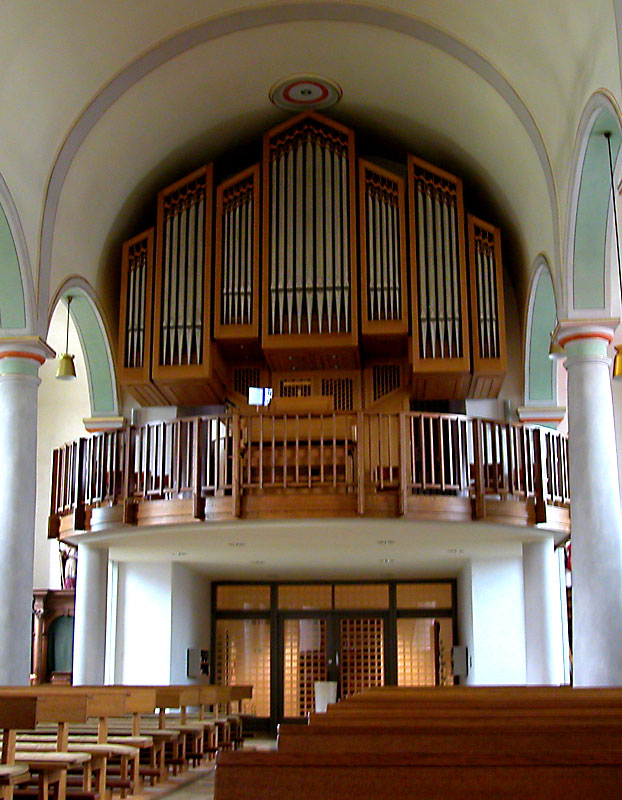 Orgel von St. Urbanus, Dorsten-Rhade.